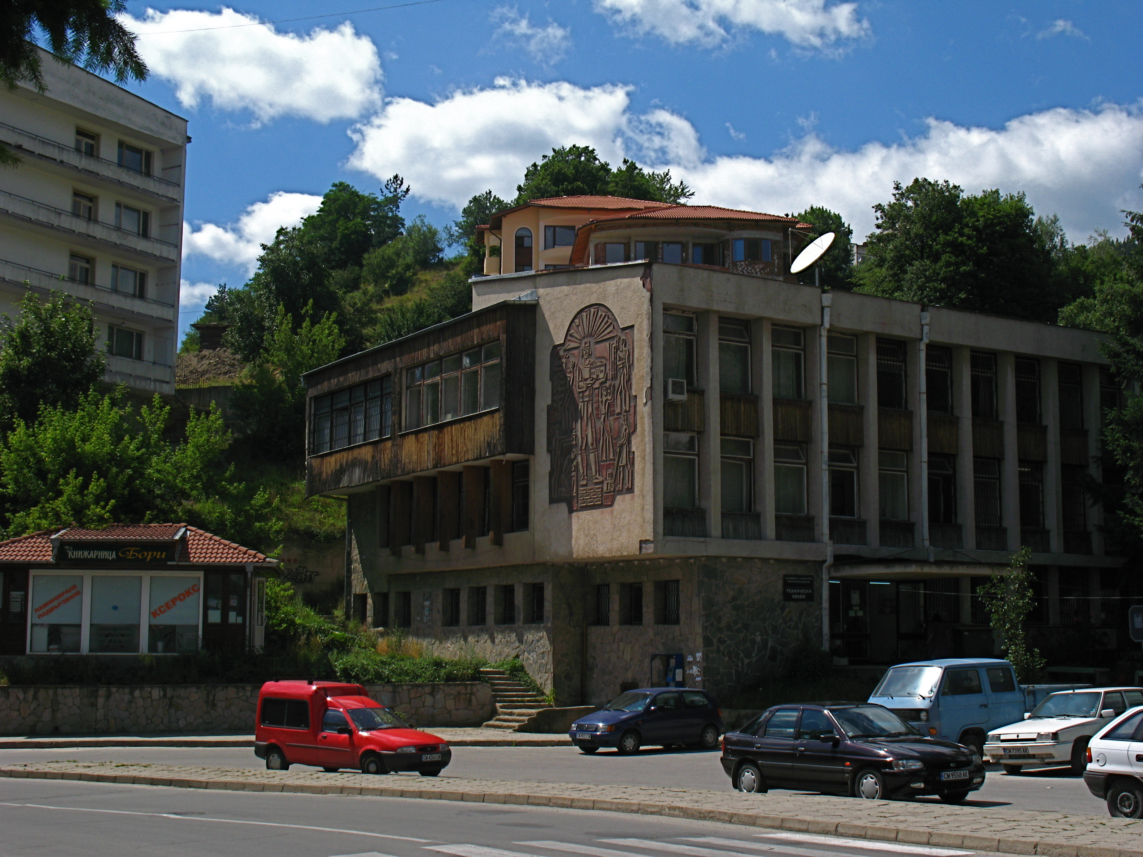 Технически колеж, ул. „Дичо Петров“, Смолян